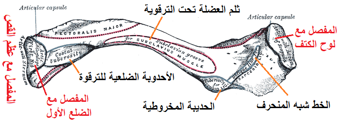 الترقوة اليسرى ، السطح الأمامي Left clavicle, anterior surface. الأحدوبة الضلعية للترقوة Costal tuberosity of clavicle الخط شبه المنحرف Trapezoid line ثلم العضلة تحت الترقوية Subclavian groove الحديبة المخروطية Conoid tubercle